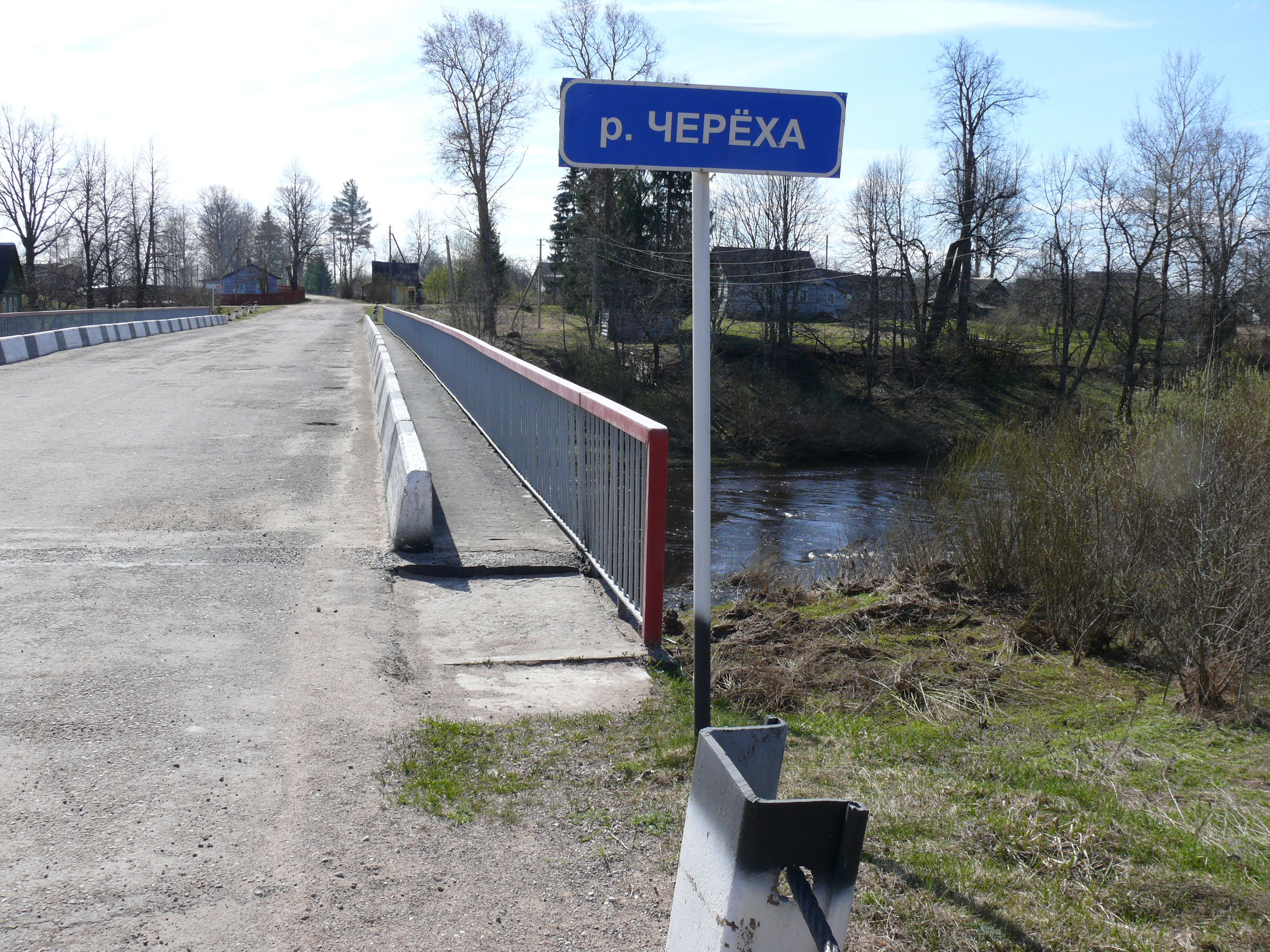 Деревня Пахотная Горка Новгородского района Новгородской области